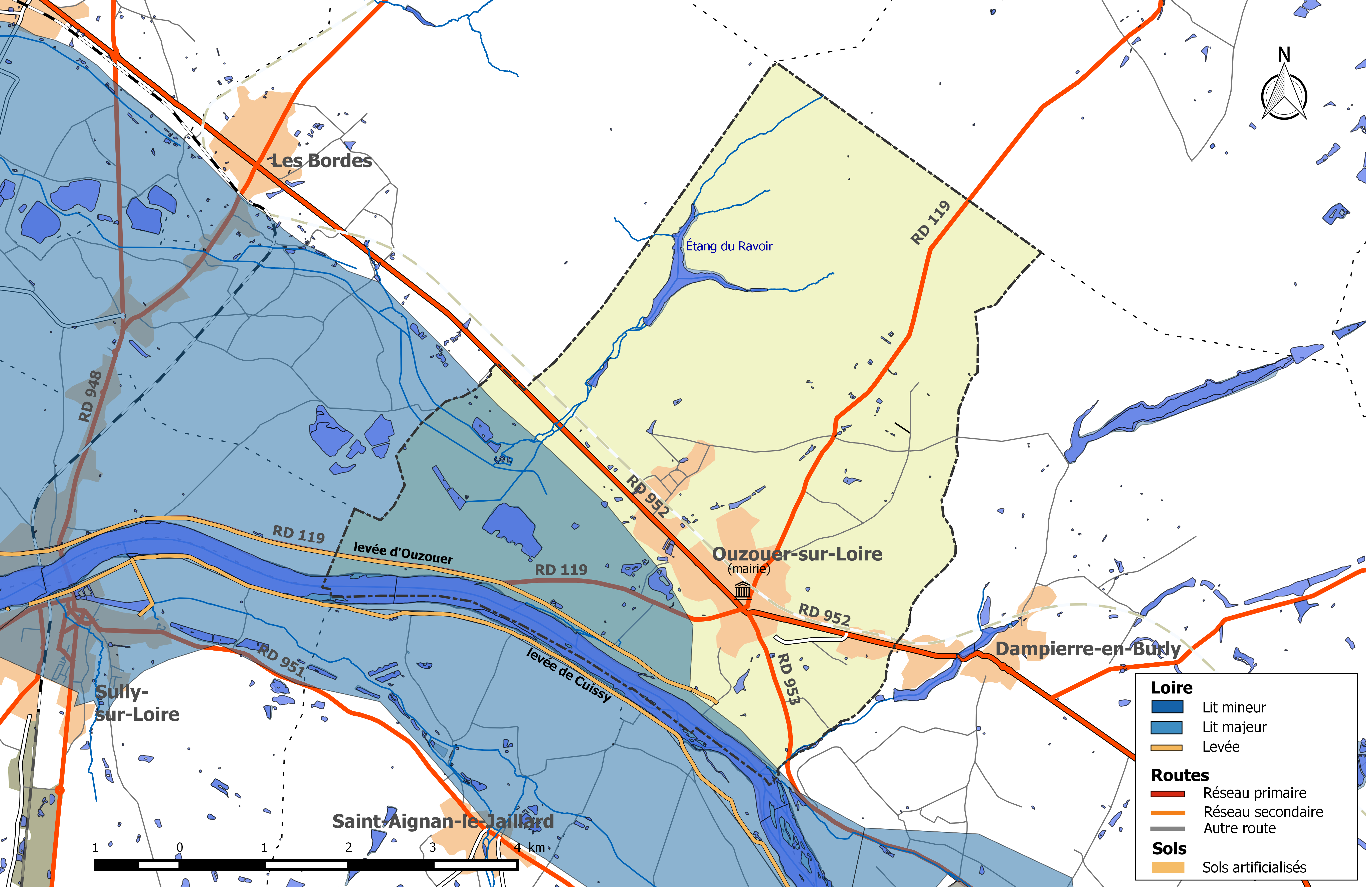 Zone inondable et réseaux hydrographique et routier de la commune d'Ouzouer-sur-Loire.